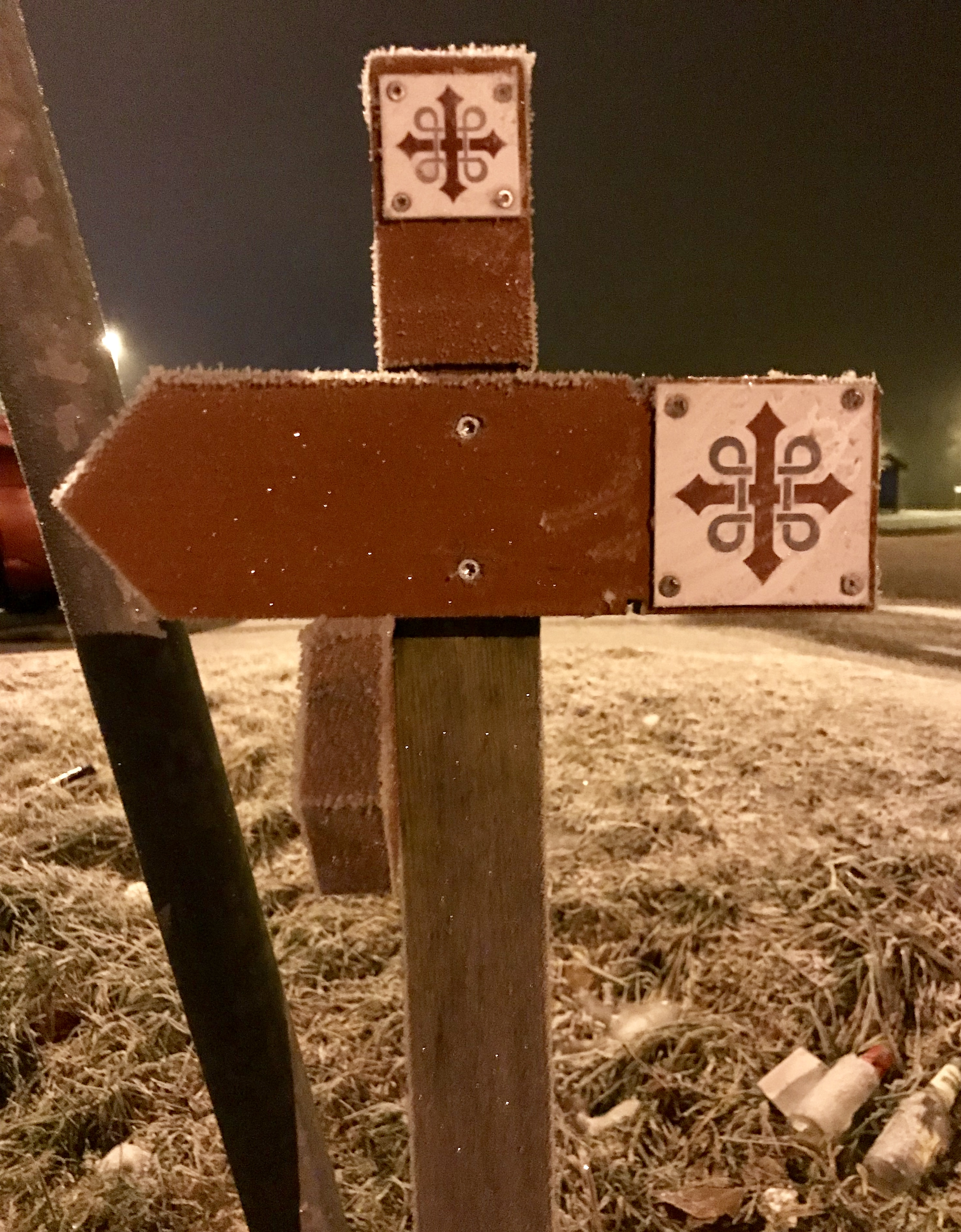 S:t Olofsmärket på denna stolpe i Greåker är en symbol som används av svenska och norska pilgrimsleder till Trondheim. Märket kombinerar sevärdhetsmärket (S:t Hanskorset) med Olofskorset. Logotypen är formgiven av Johanna Figur Waddington.